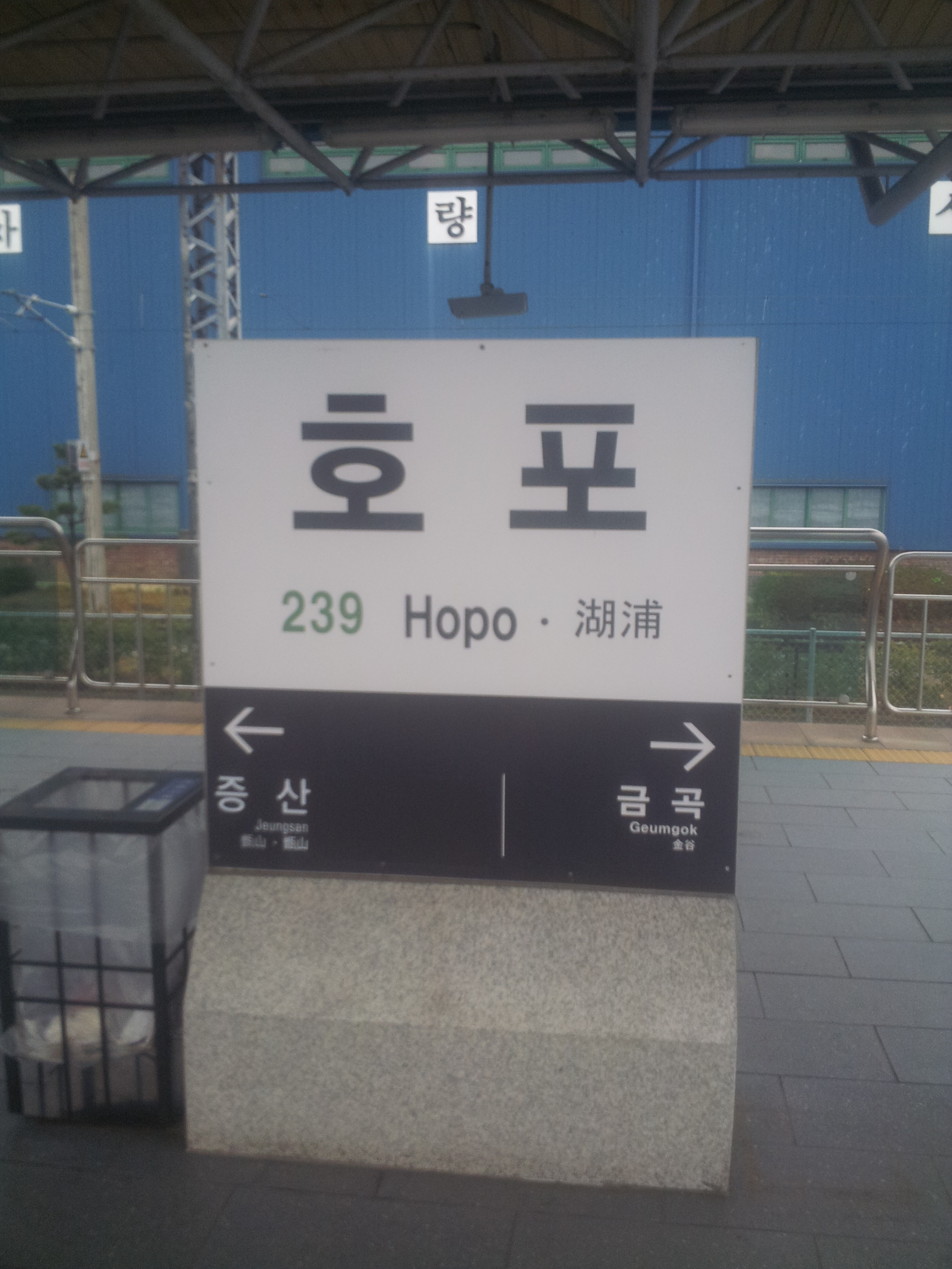 호포역 개정 역명판